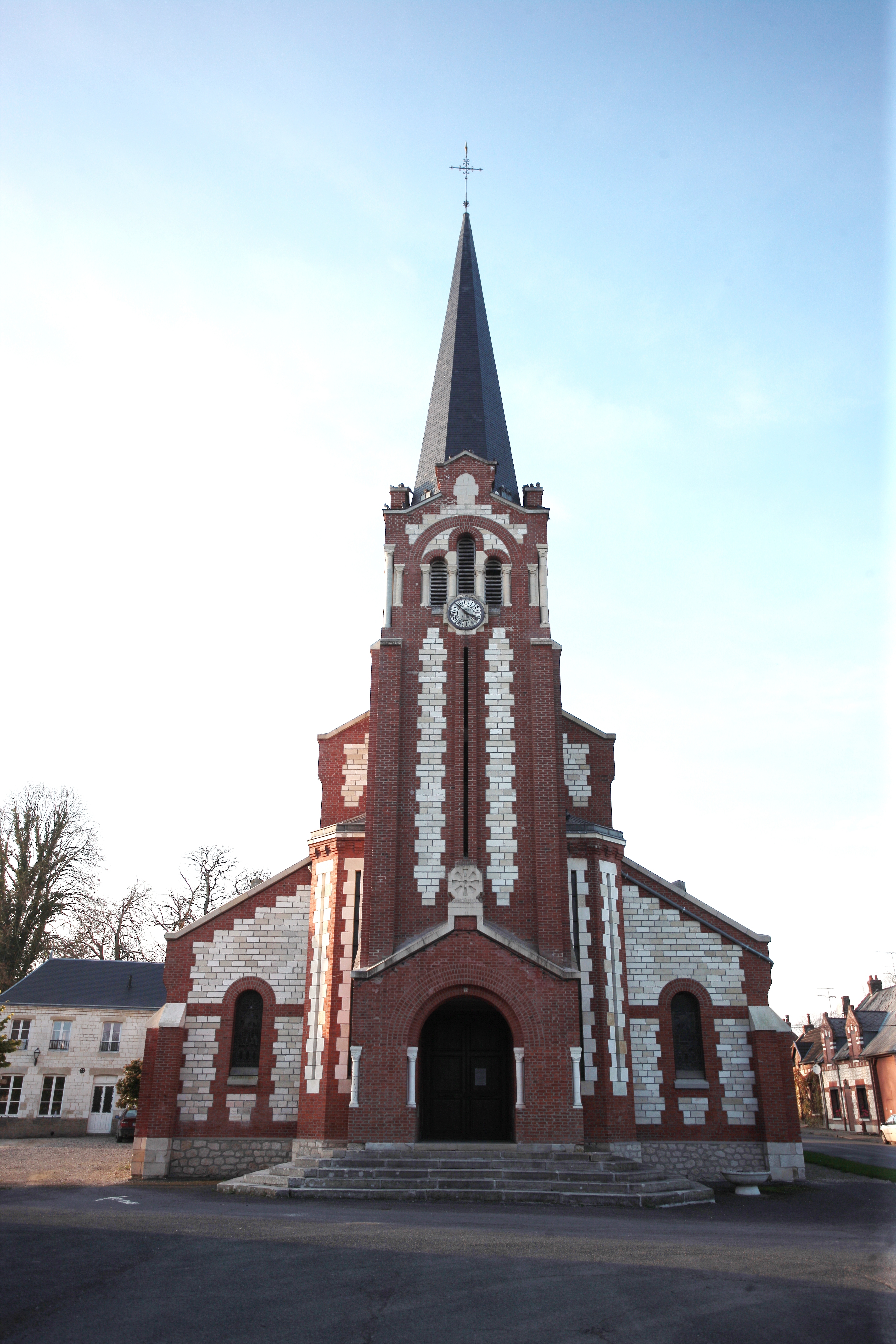 Village Ardennais